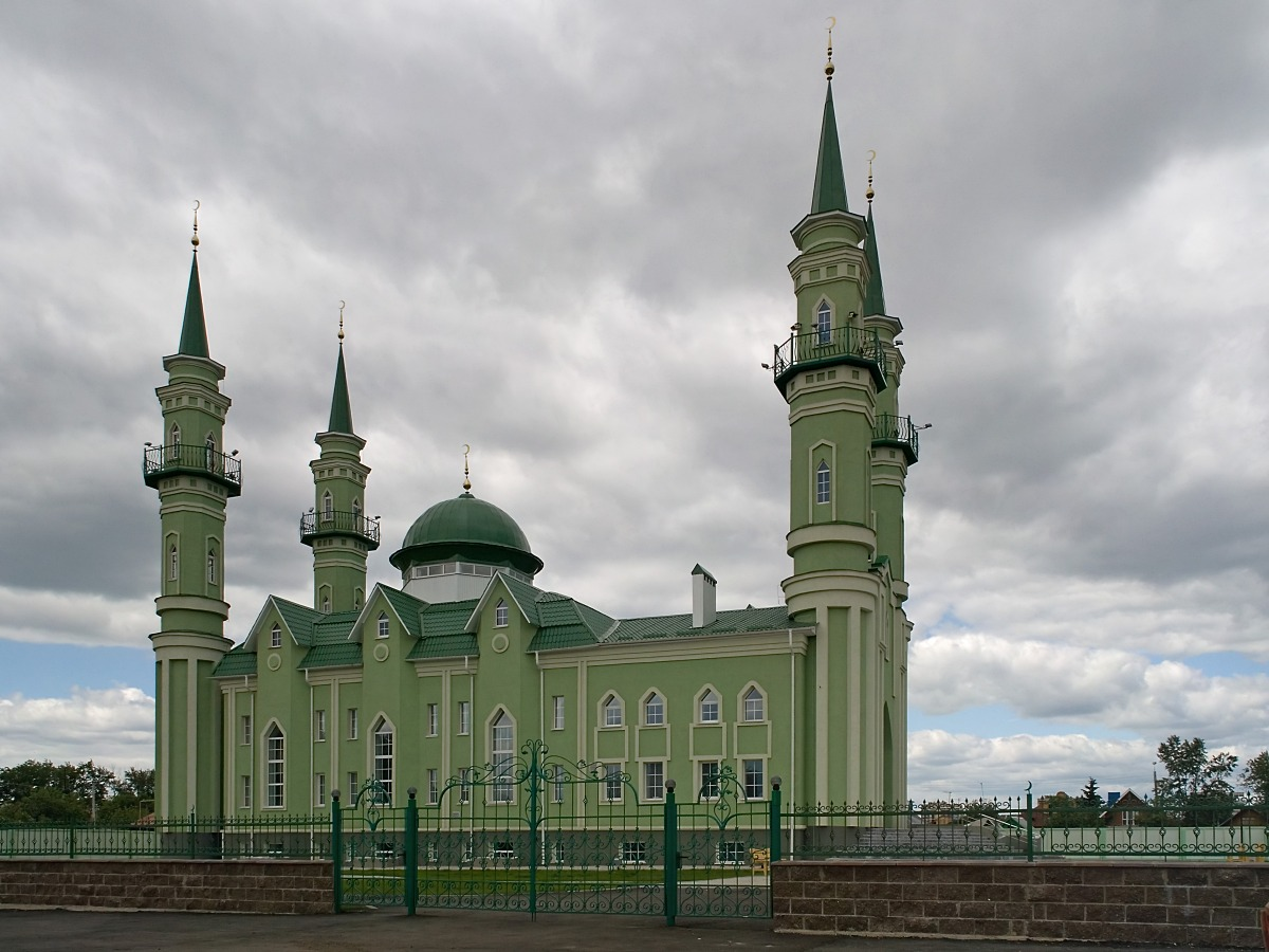 Новая стерлитамакская мечеть